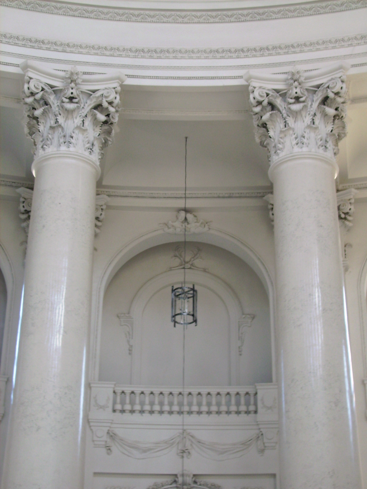 Sankt Blasien Schwarzwald